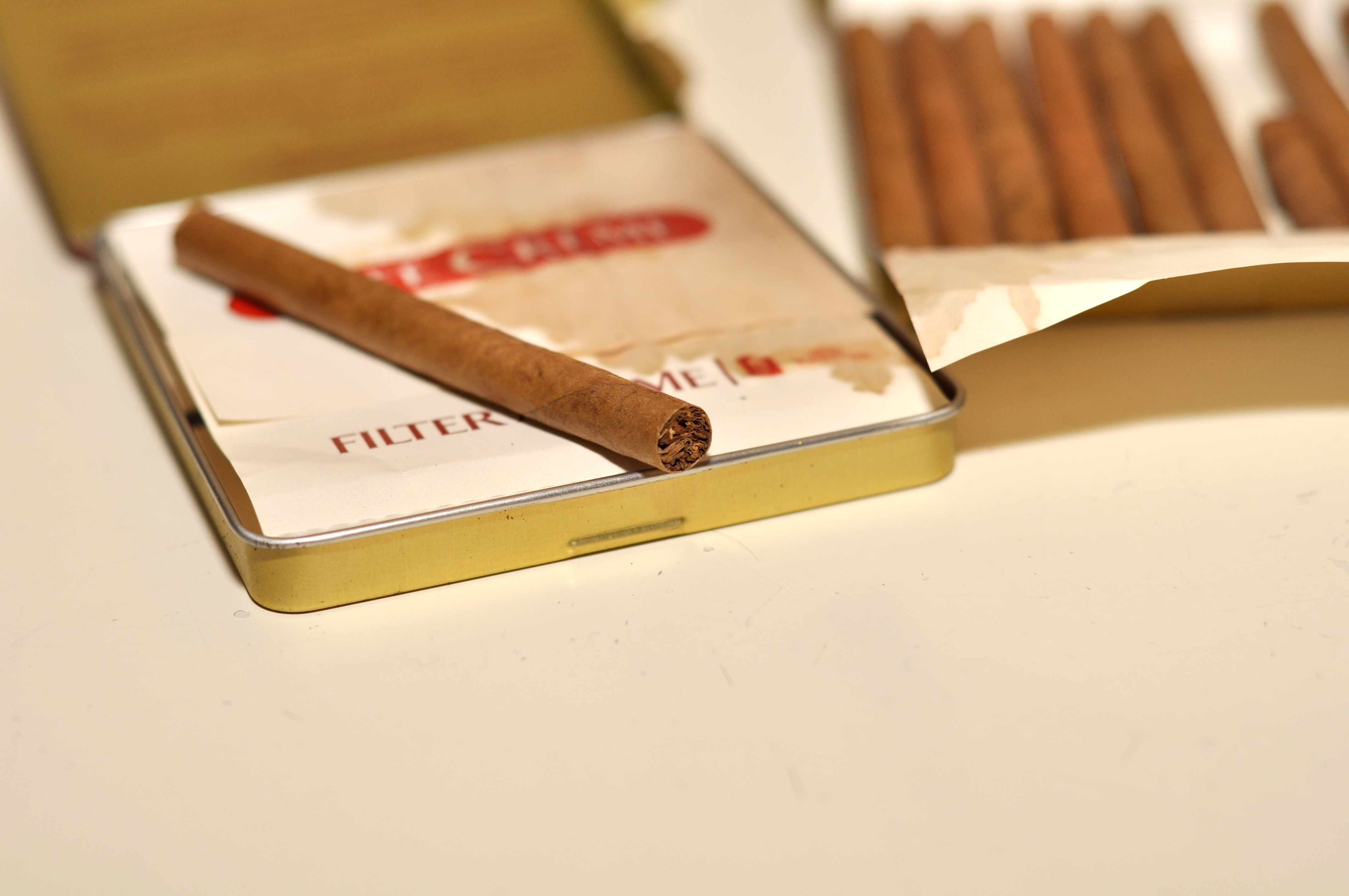 En fedtet pak' Café Crème Filter Arôme